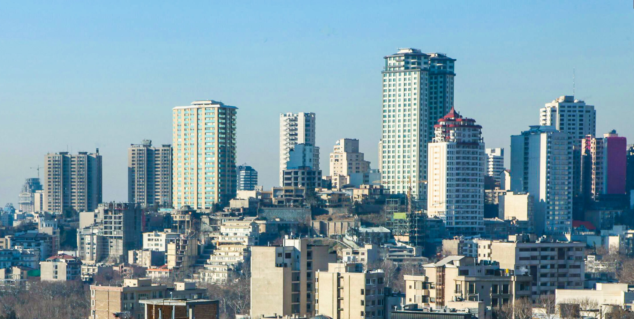 Tehran from Qeytariyeh